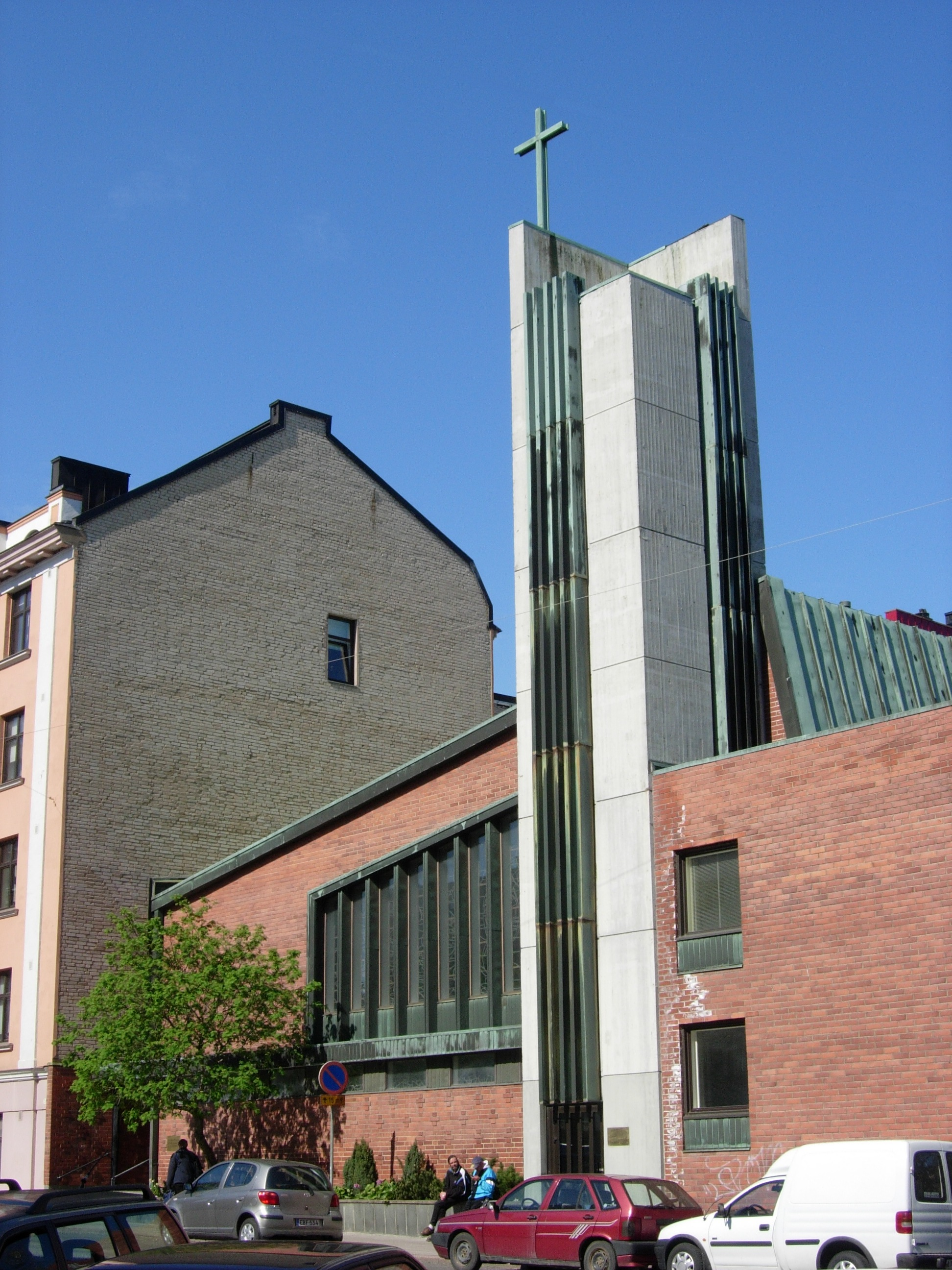 Turun katolinen kirkko Ursininkadulla